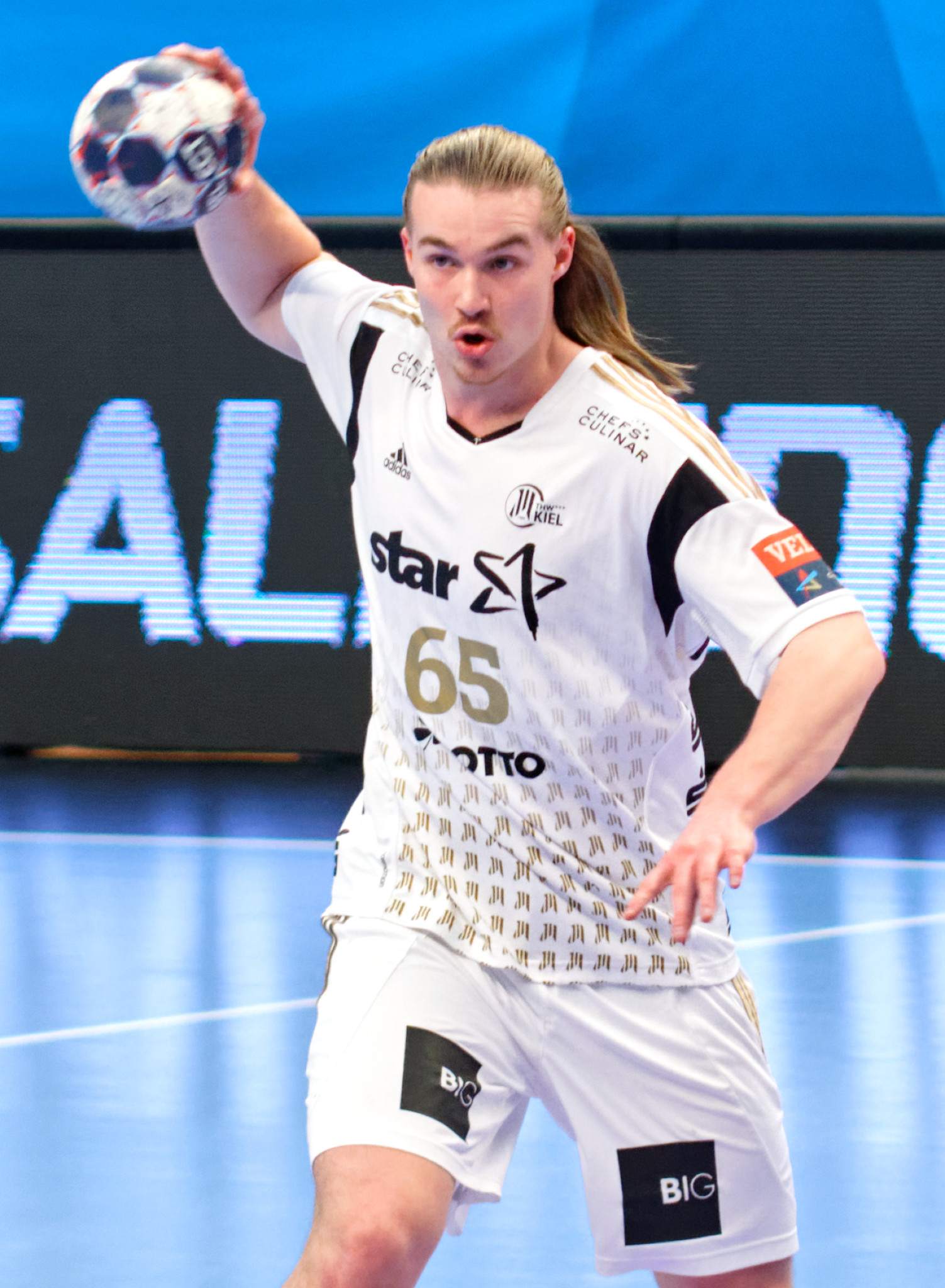 Rencontre de phase de groupe de la ligue des champions 2016-17 entre le PSG et le THW Kiel. A Coubertin, le 12 mars 2017.